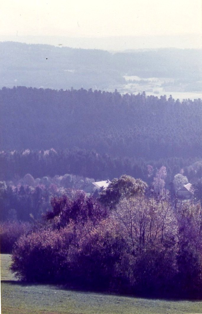 Les terroirs forestiers et de pâturage